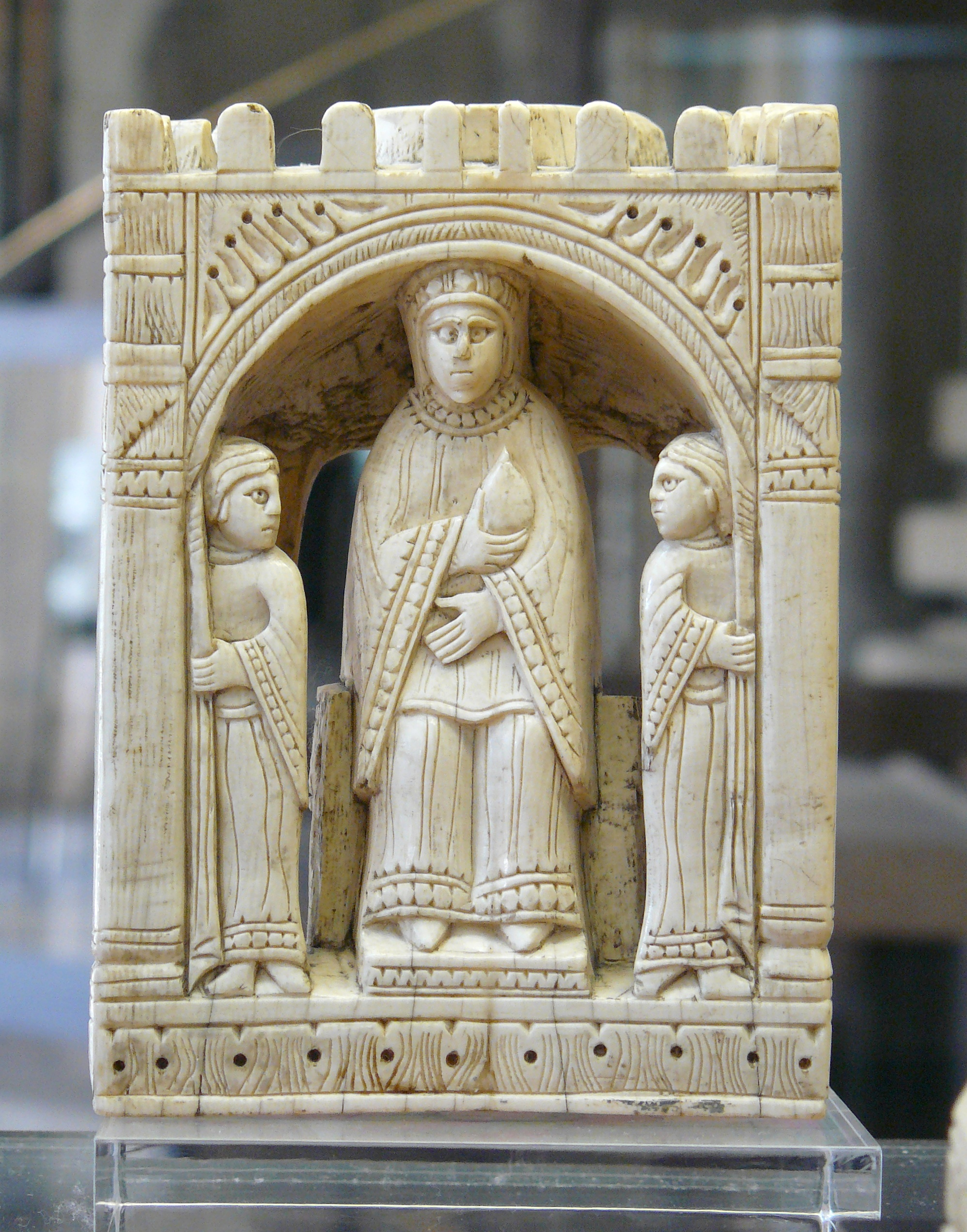 Échiquier dit de Charlemagne, reine, ivoire d'éléphant, XIe siècle, Italie méridionale, trace de peinture, d'un ensemble de 16 pièces conservées dans le trésor de Saint-Denis - Hauteur environ 8 cm - Cabinet des médailles, Paris, n° Inv 305 à 323